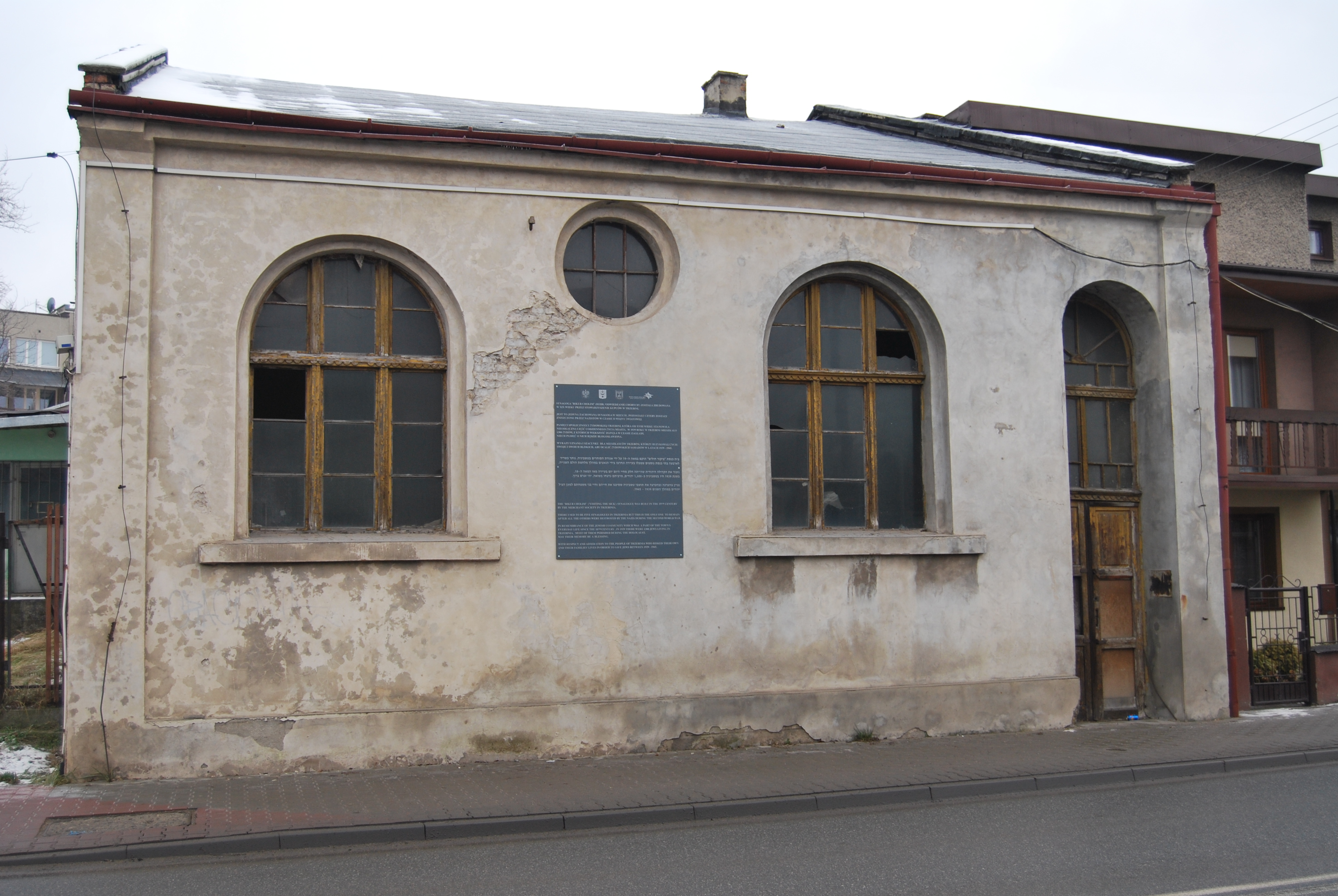 Synagoga w Trzebini. Grudzień 2016